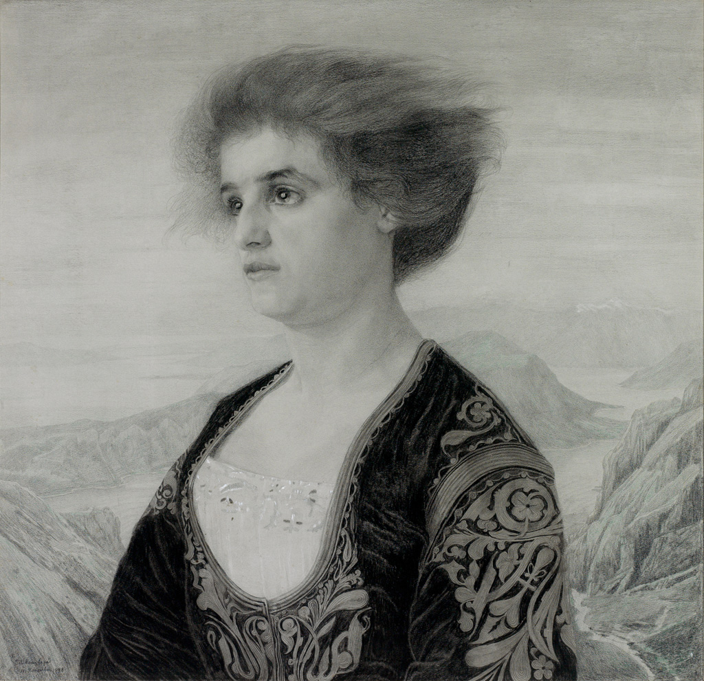 Portrait einer jungen Frau.